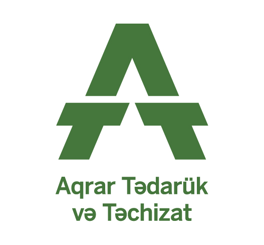 ATT logo